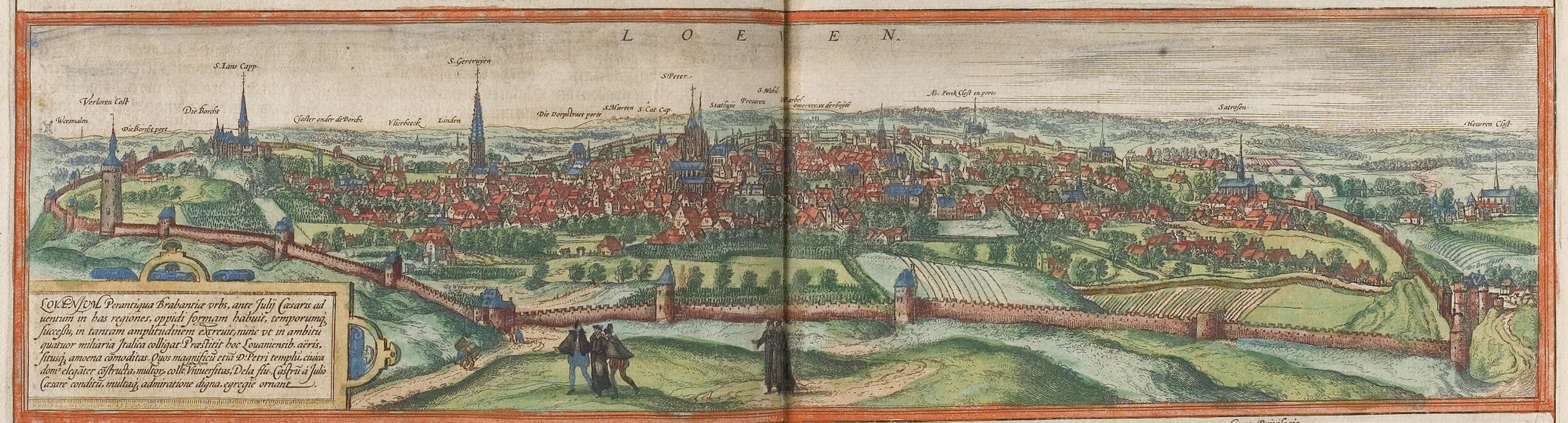 Leuven